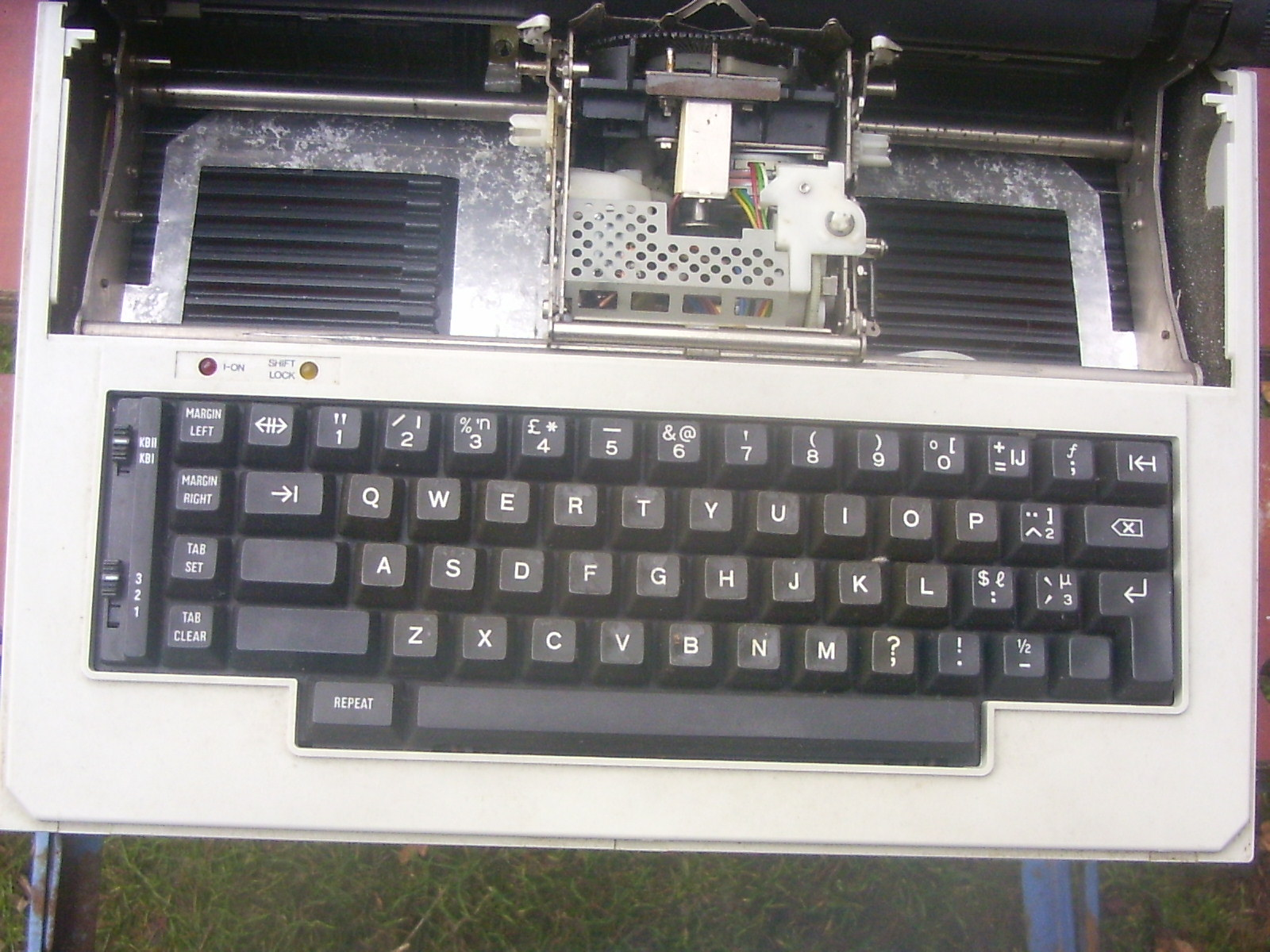 Olivetti elektrische schrijfmachine. Type onbekend. Geschat bouwjaar 1984. Nederlands toetsenbord met ij.